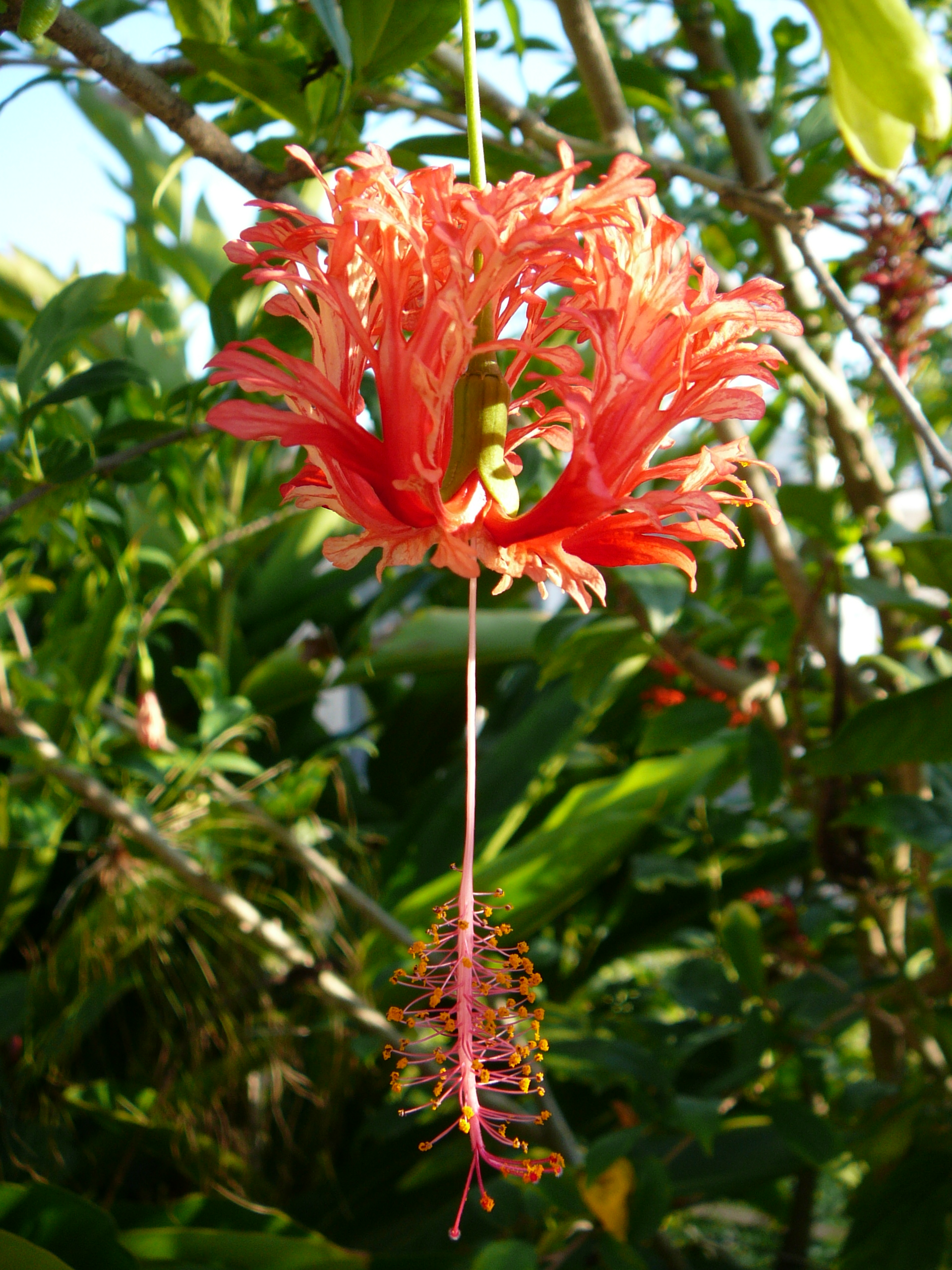 Hibiscus schizopetalus (Japanese Lantern), garden in Fort Lauderdale Florida